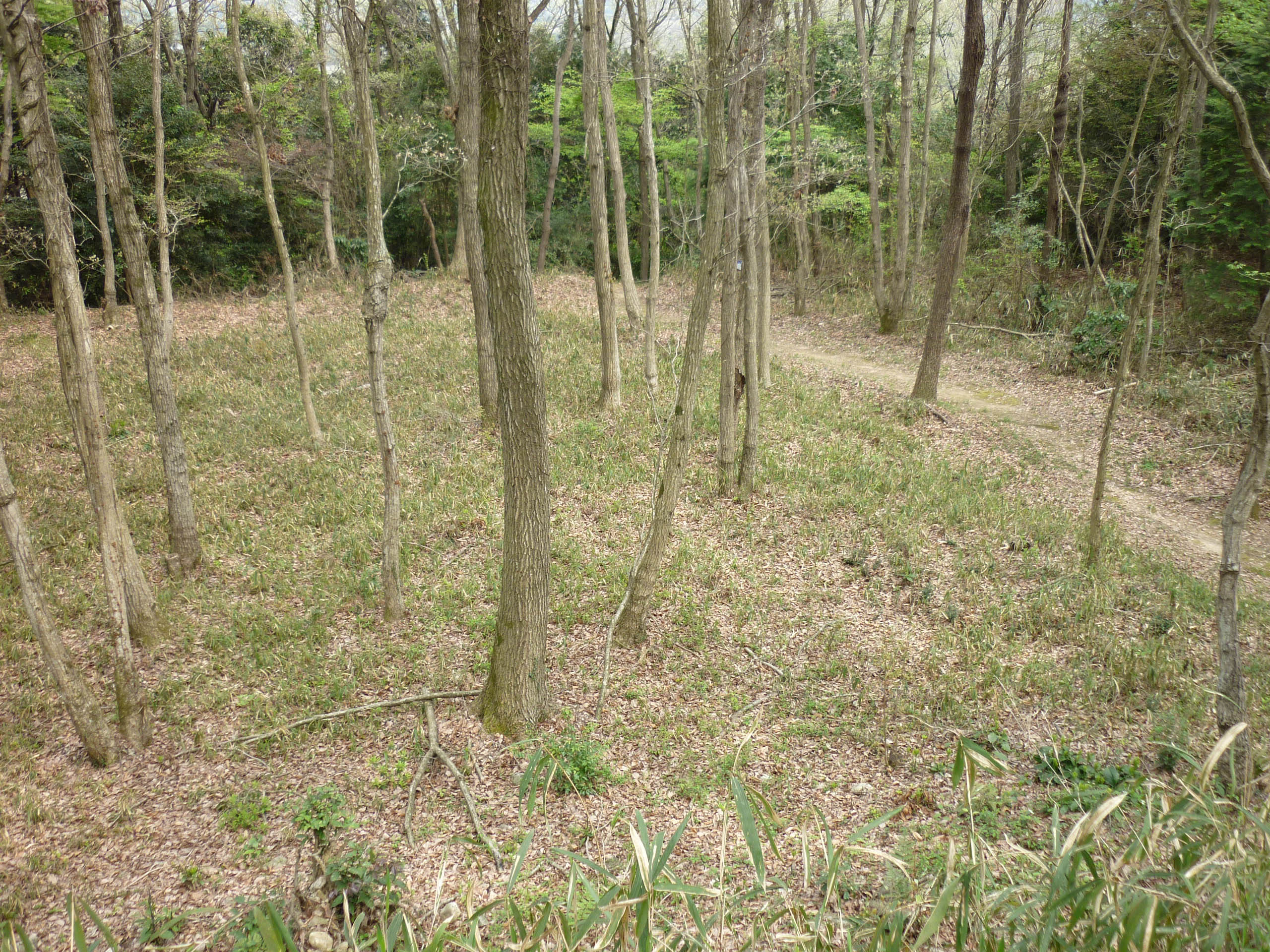 本丸跡